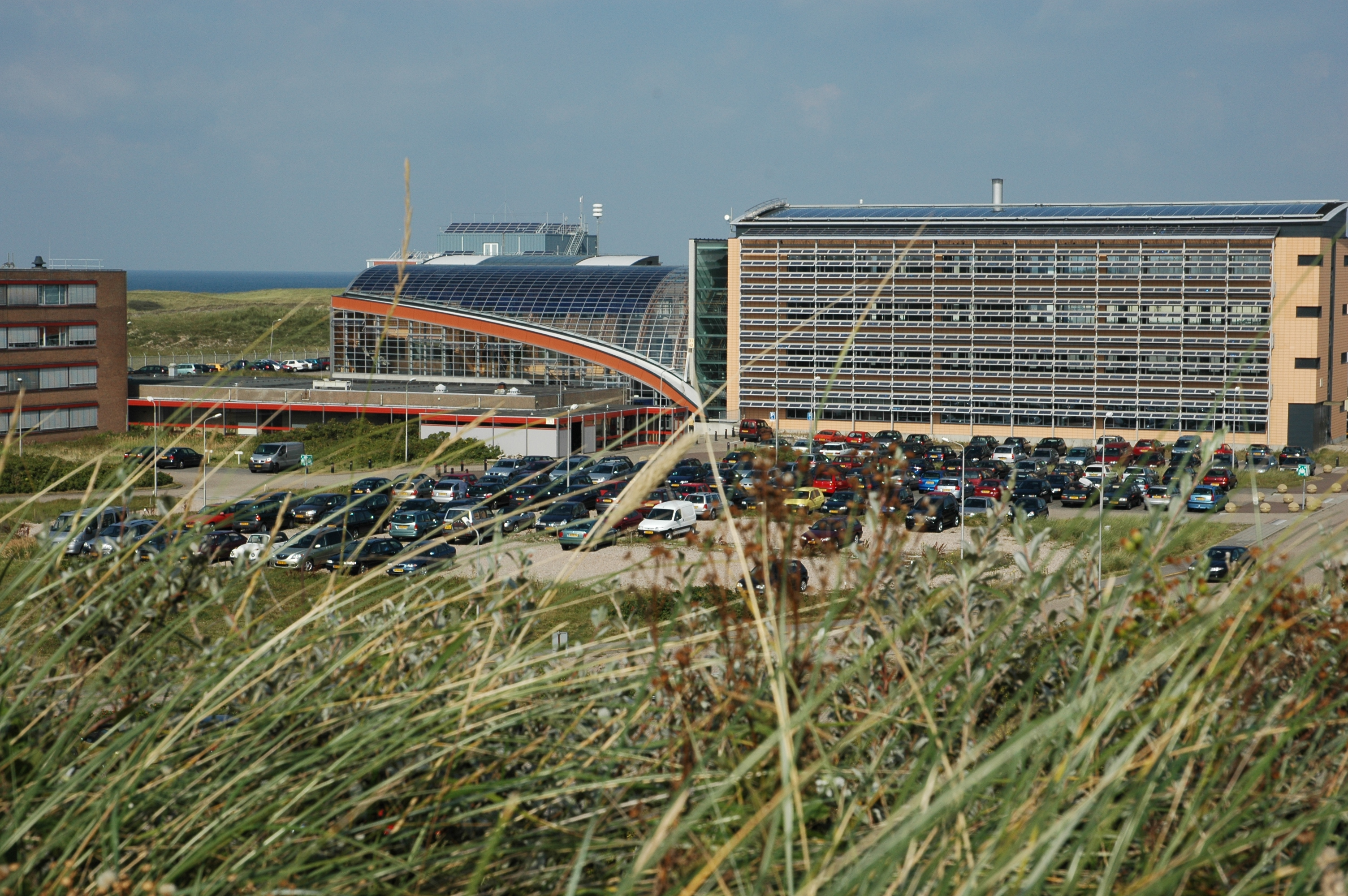 ECN site in Petten